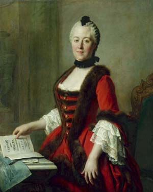 Maria Antonia of Bavaria (1724–1780)label QS:Lru,"Мария Антония Баварская (1724–1780)" label QS:Lde,"Maria Antonia von Bayern (1724–1780)" label QS:Len,"Maria Antonia of Bavaria (1724–1780)" label QS:Lfr,"Marie Antoinette de Bavière (1724–1780)"